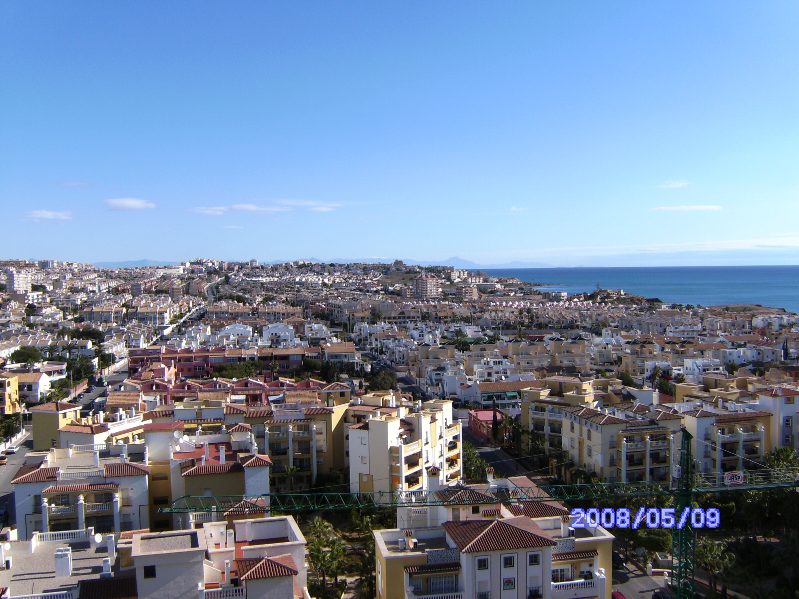 Noves urbanitzacions de Torrevella situades al nord de la Ciutat, vistes des de la Platja de Los Locos.